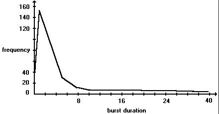 Монгол: Процессор ба Оролт-Гаралтын цикл